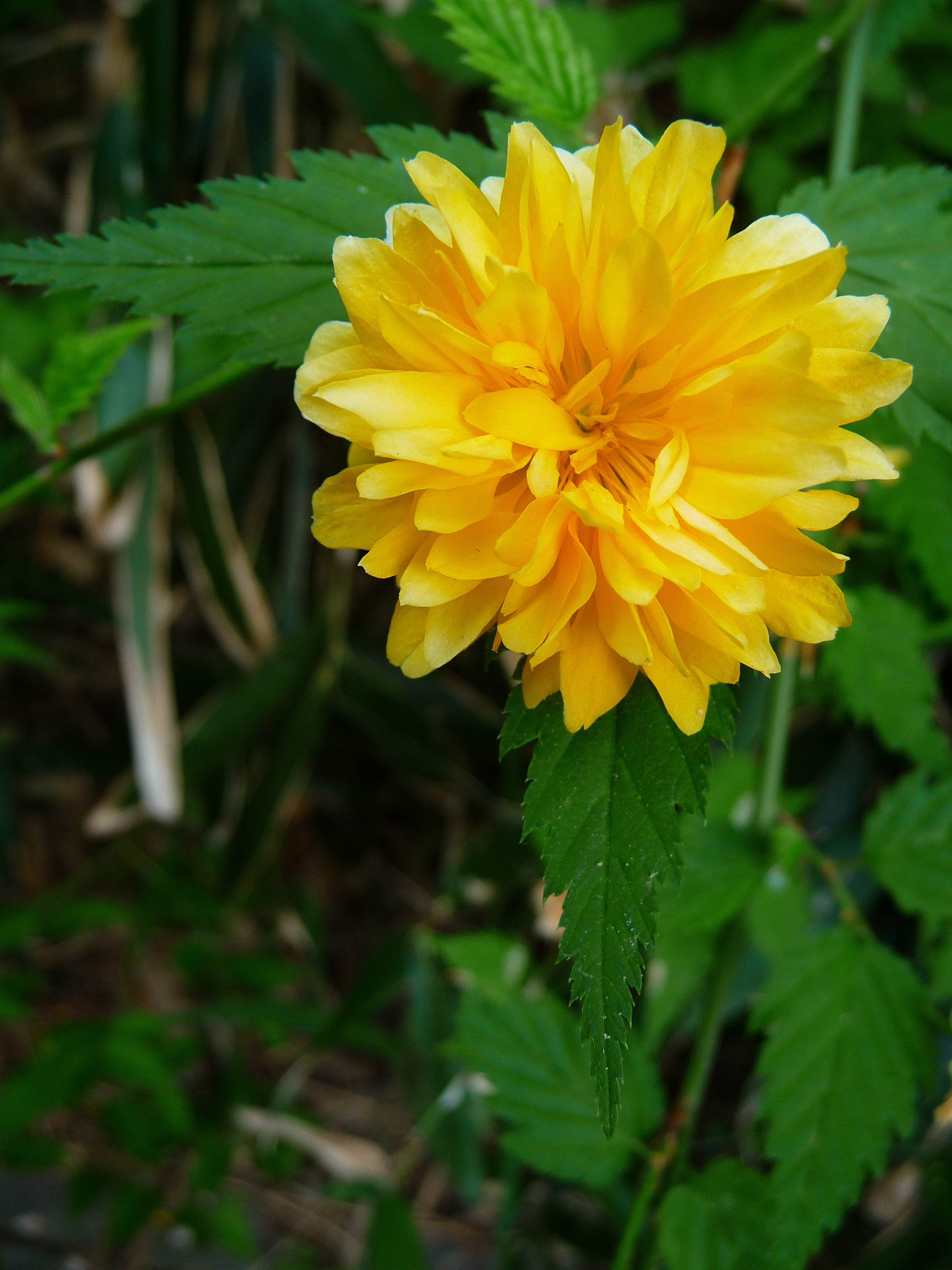 Einzelne Blüte einer Kerria japonica (wahrscheinlich 'Pleniflora')